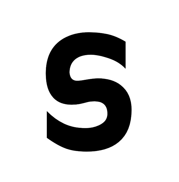 ട മലയാളം അക്ഷരം